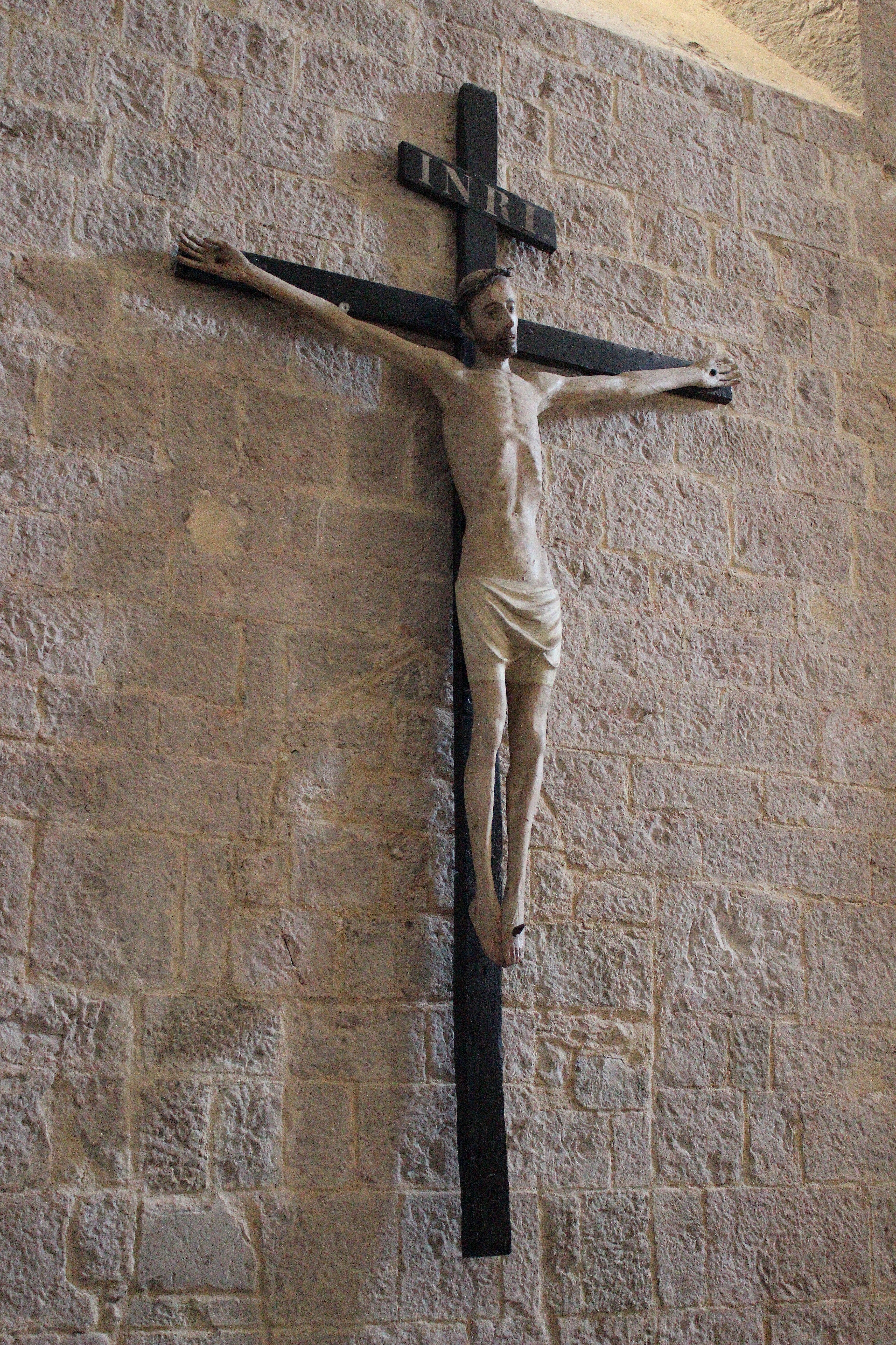 Abbaye de La Celle, département du Var, France. Christ d'origine catalane (XIVe siècle) dans l'église Notre-Dame de l'Assomption